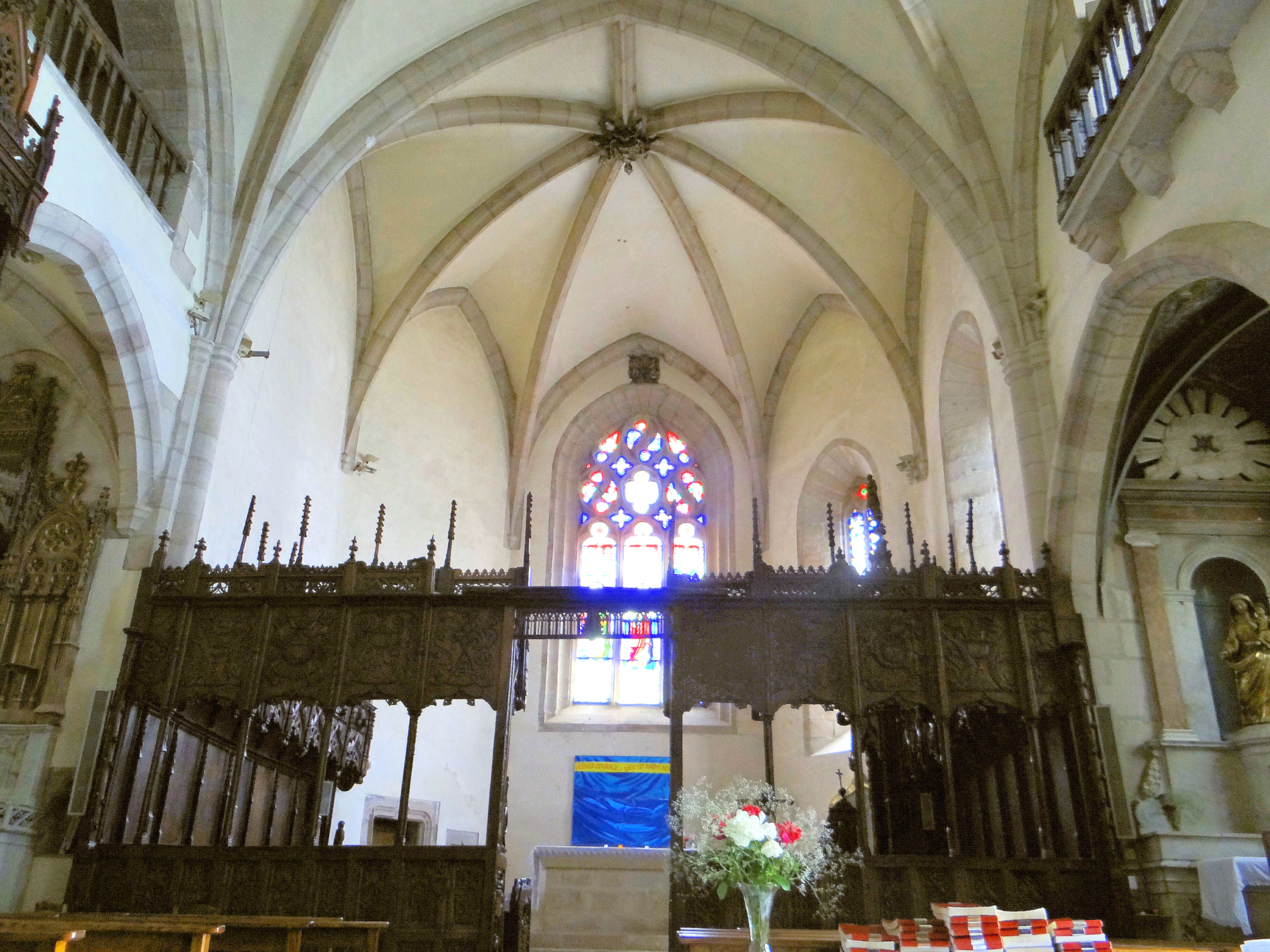 Salles-Curan - Église Saint-Géraud - Nef avec les stalles .